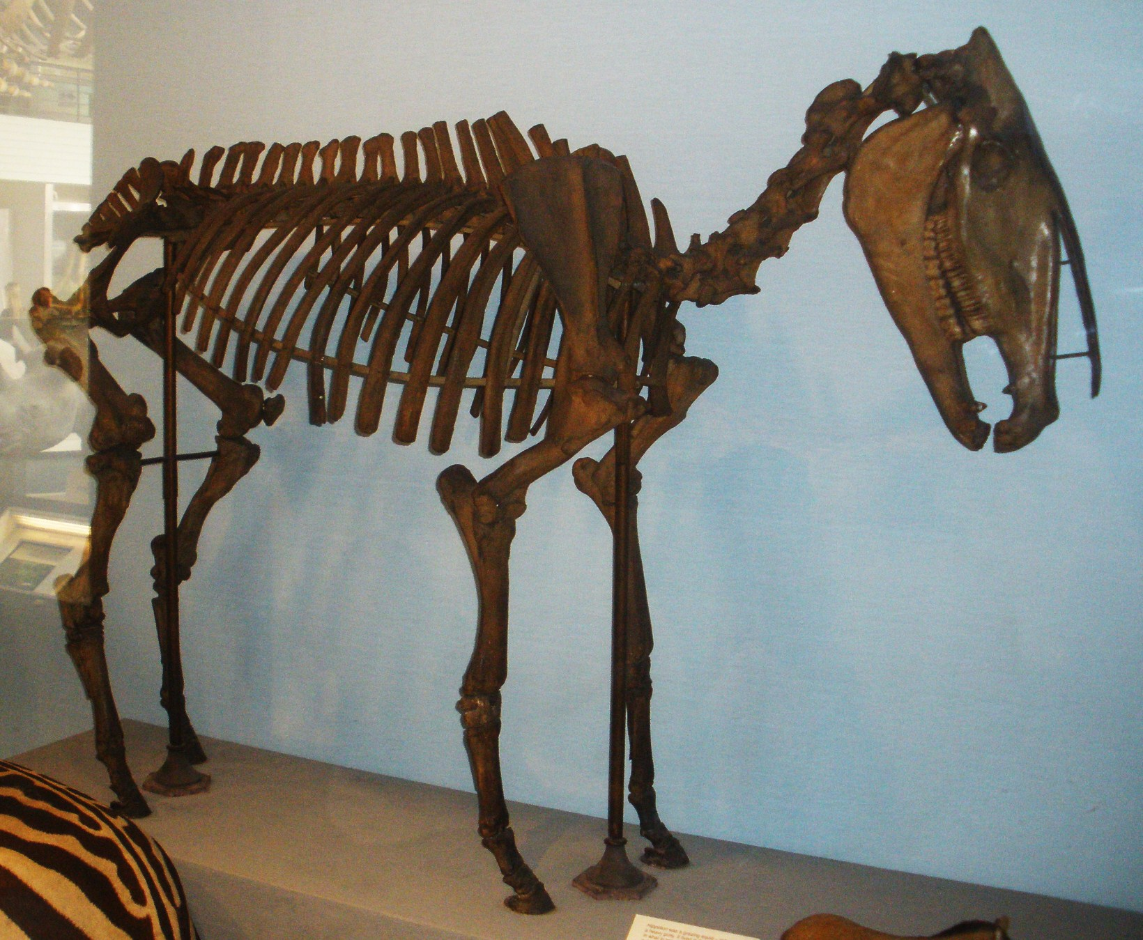 Fossil of Hippidion, an extinct mammal -- Took the photo at Natural History Museum, London